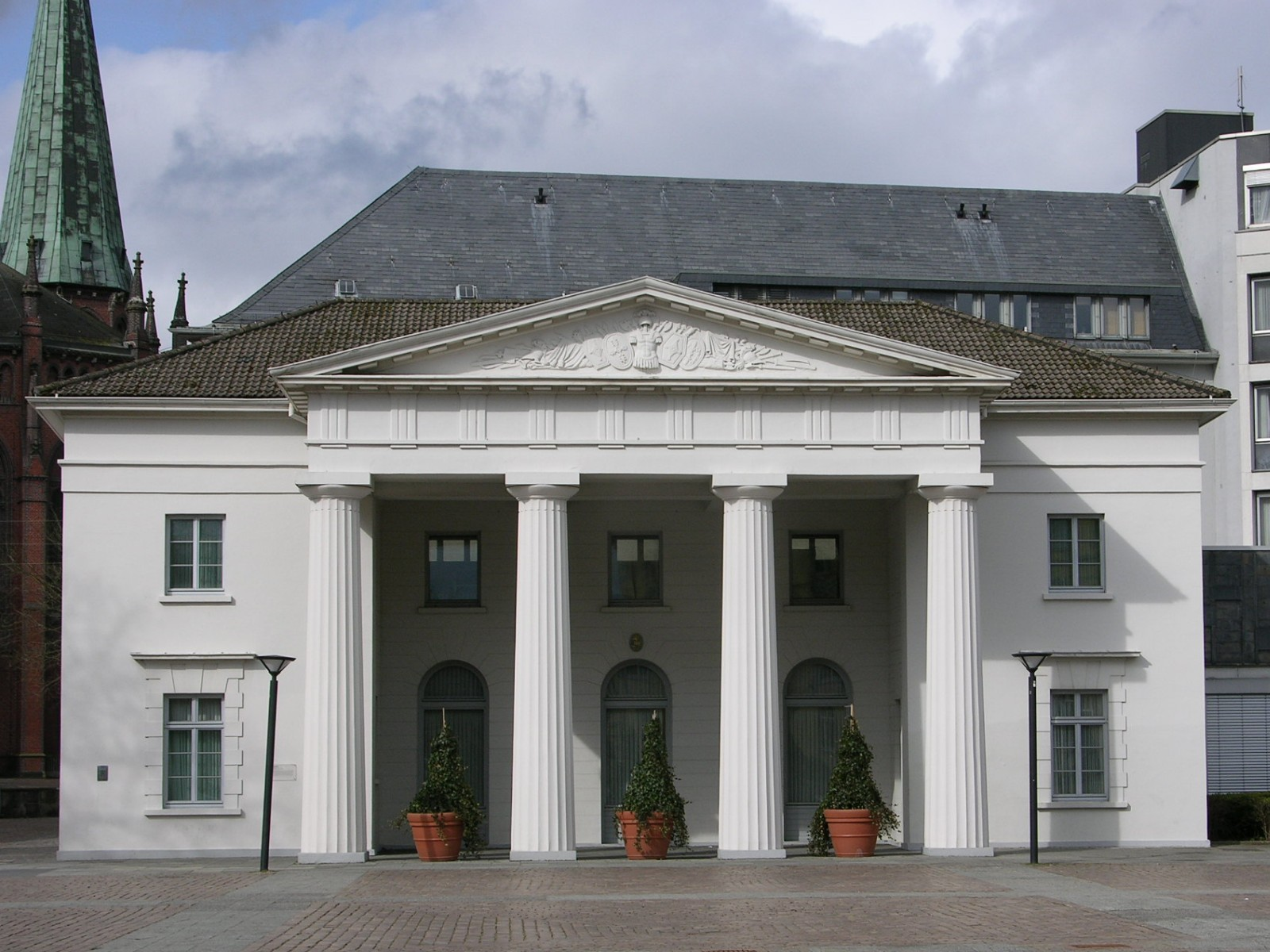 Description: Die Alte Schlosswache in Oldenburg (Oldb) Source: selbst gemacht / 2005-03-13 Photographer: NewPapillon